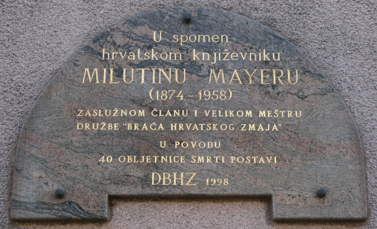 spomen ploča Milutinu Mayeru u Križevcima